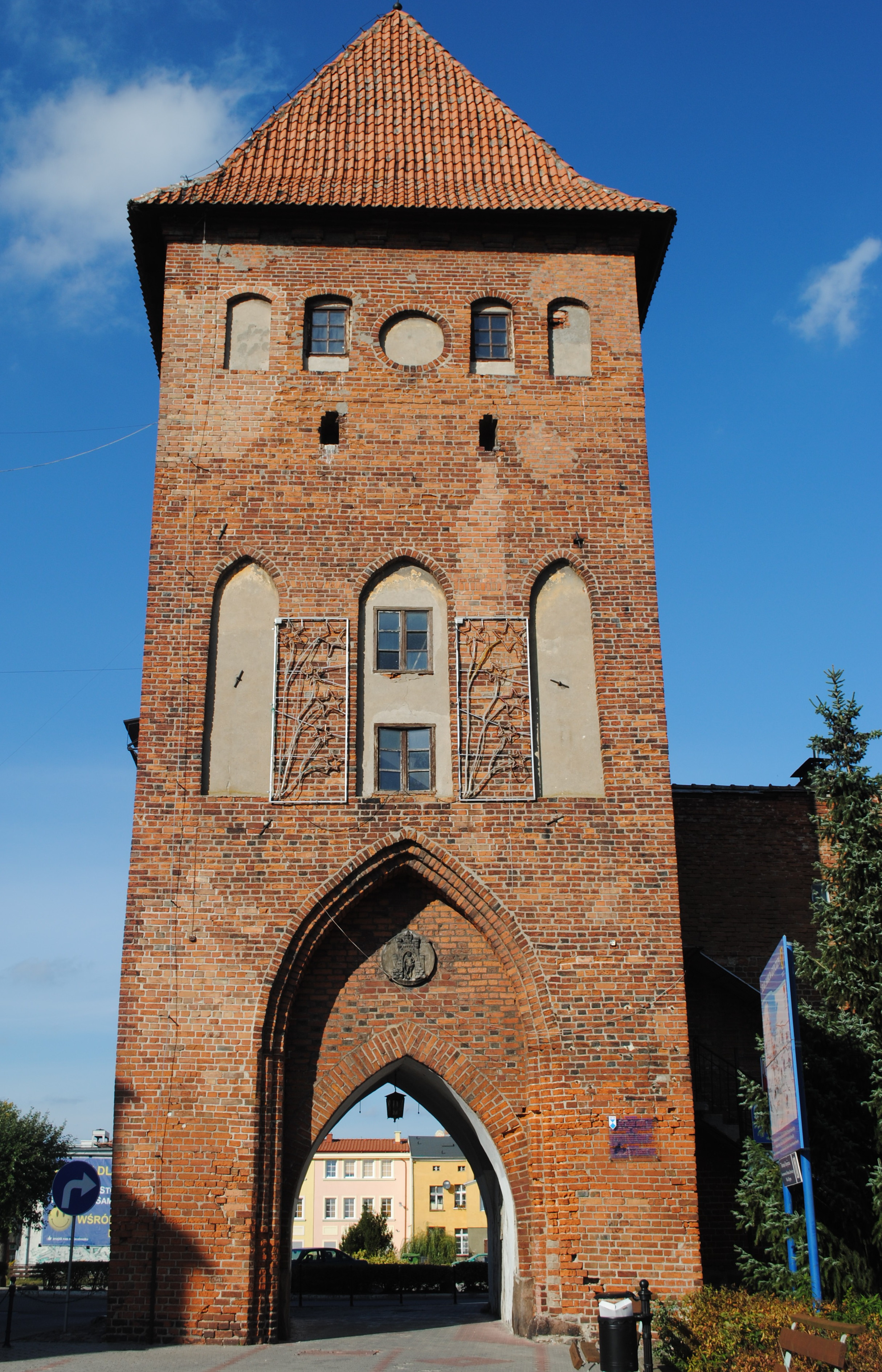 Prabuty, Brama Kwidzyńska (Szpitalna), 1 poł. XIV, 1908 (w zespole murów obronnych)